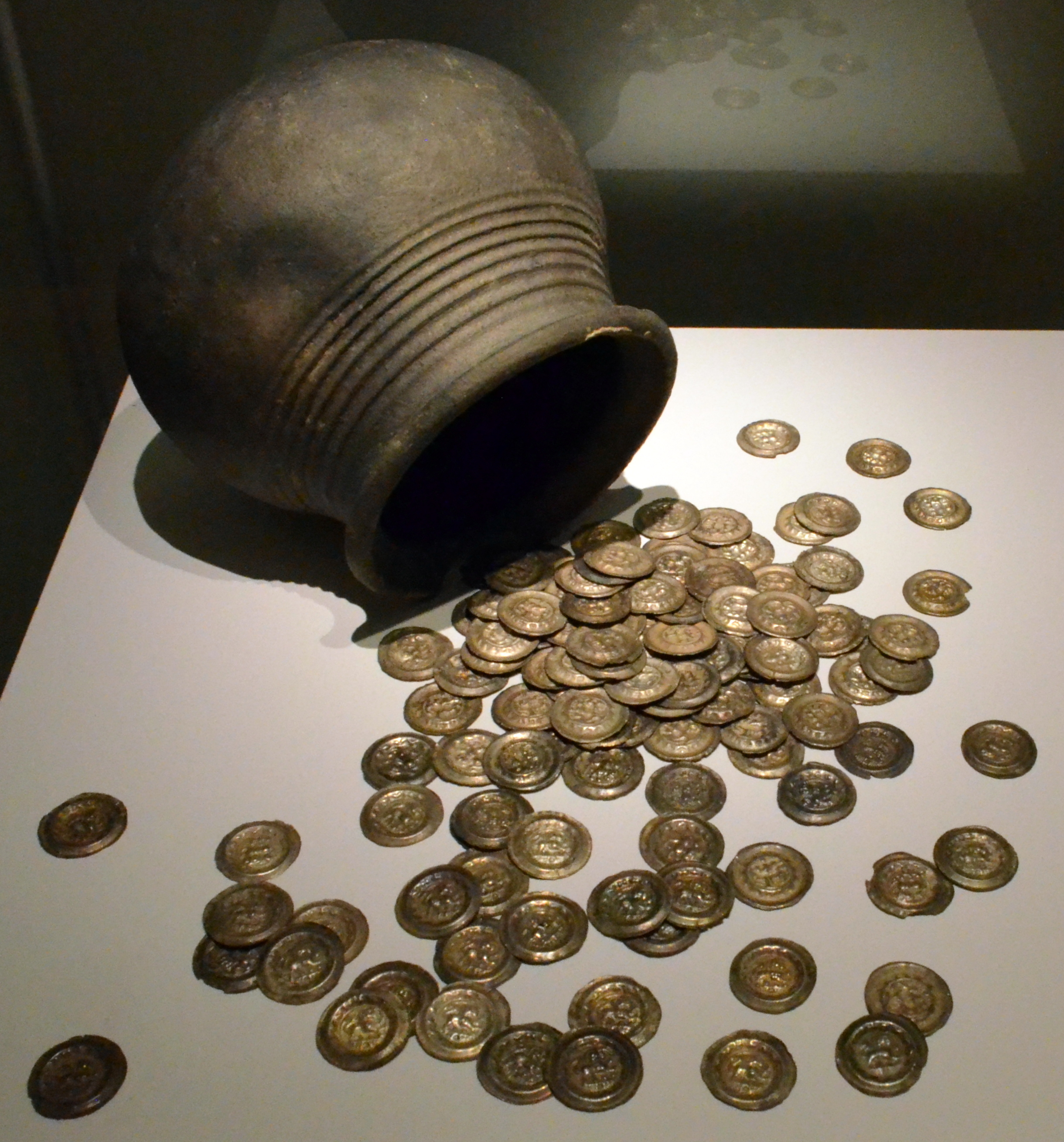 Braunschweigisches Landesmuseum: Münzfund von Lucklum, Depotfund von 1859. 120 Brakteaten (alle vor 1240) und der irdene Topf, in dem sie gefunden wurden.